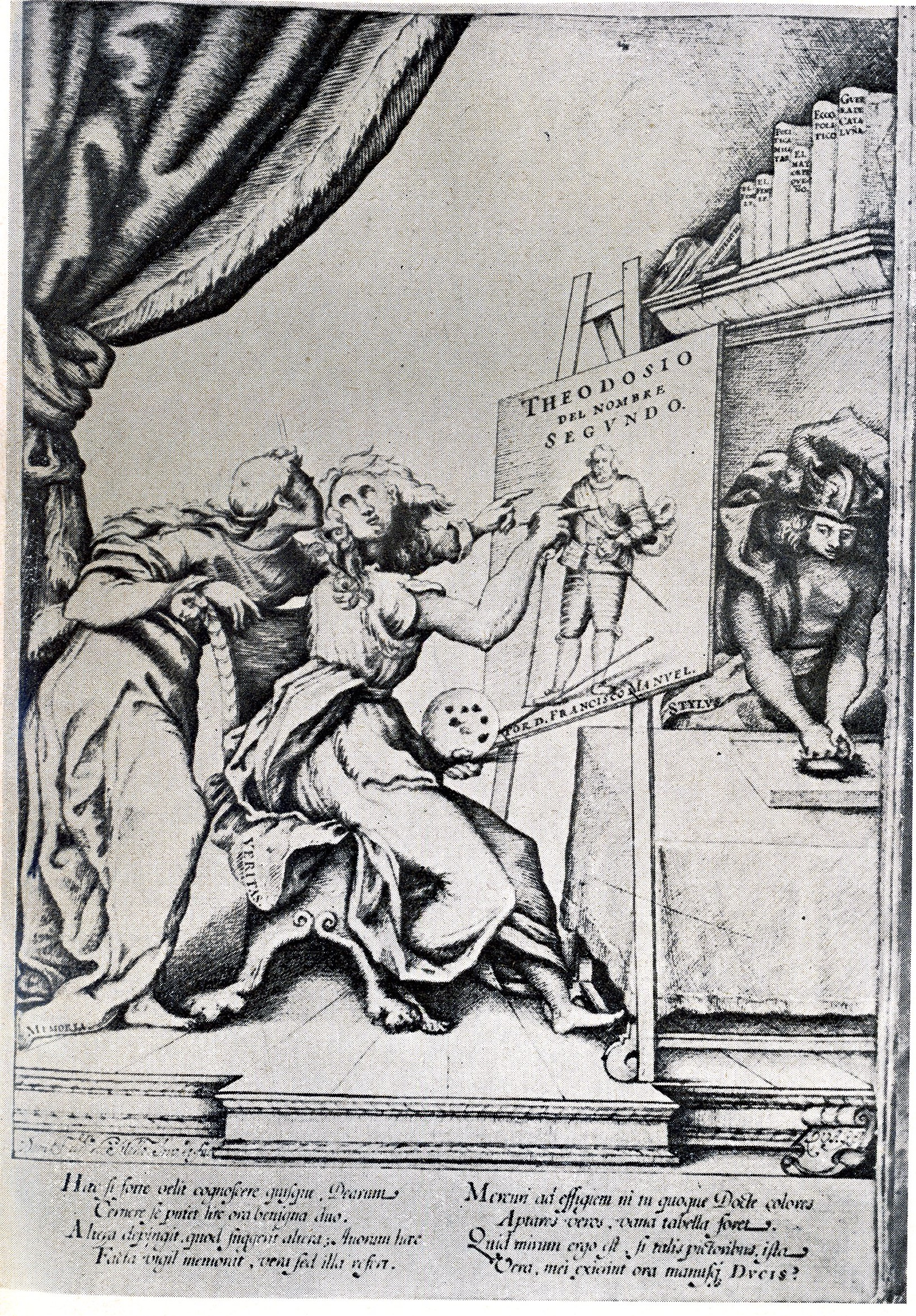 dessin pour le frontispice de D. Teodosio II de Francisco Manuel de Melo, réalisé par son cousin, sous la direction de l'auteur